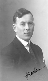 Johannes Kaarde